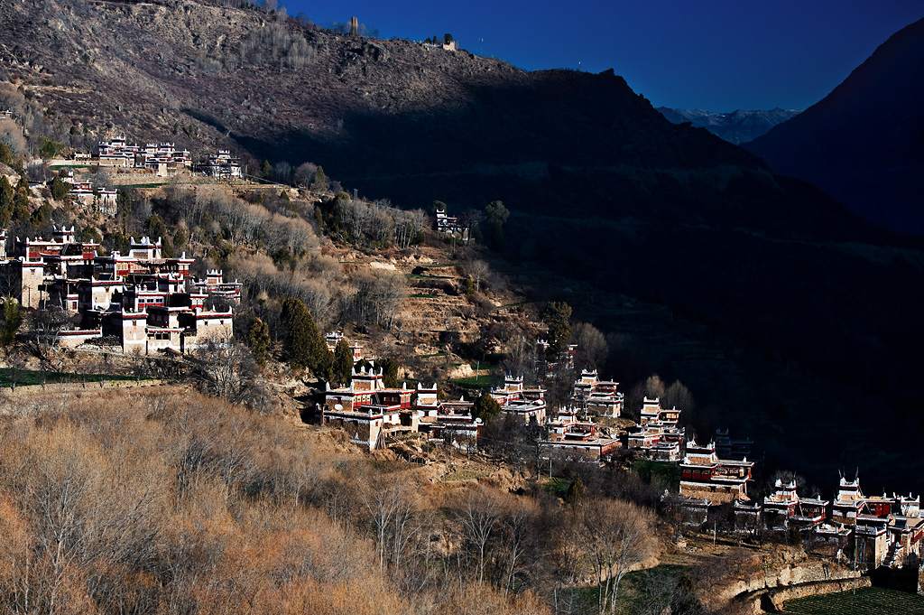 甲居藏寨1--爵士鼓手